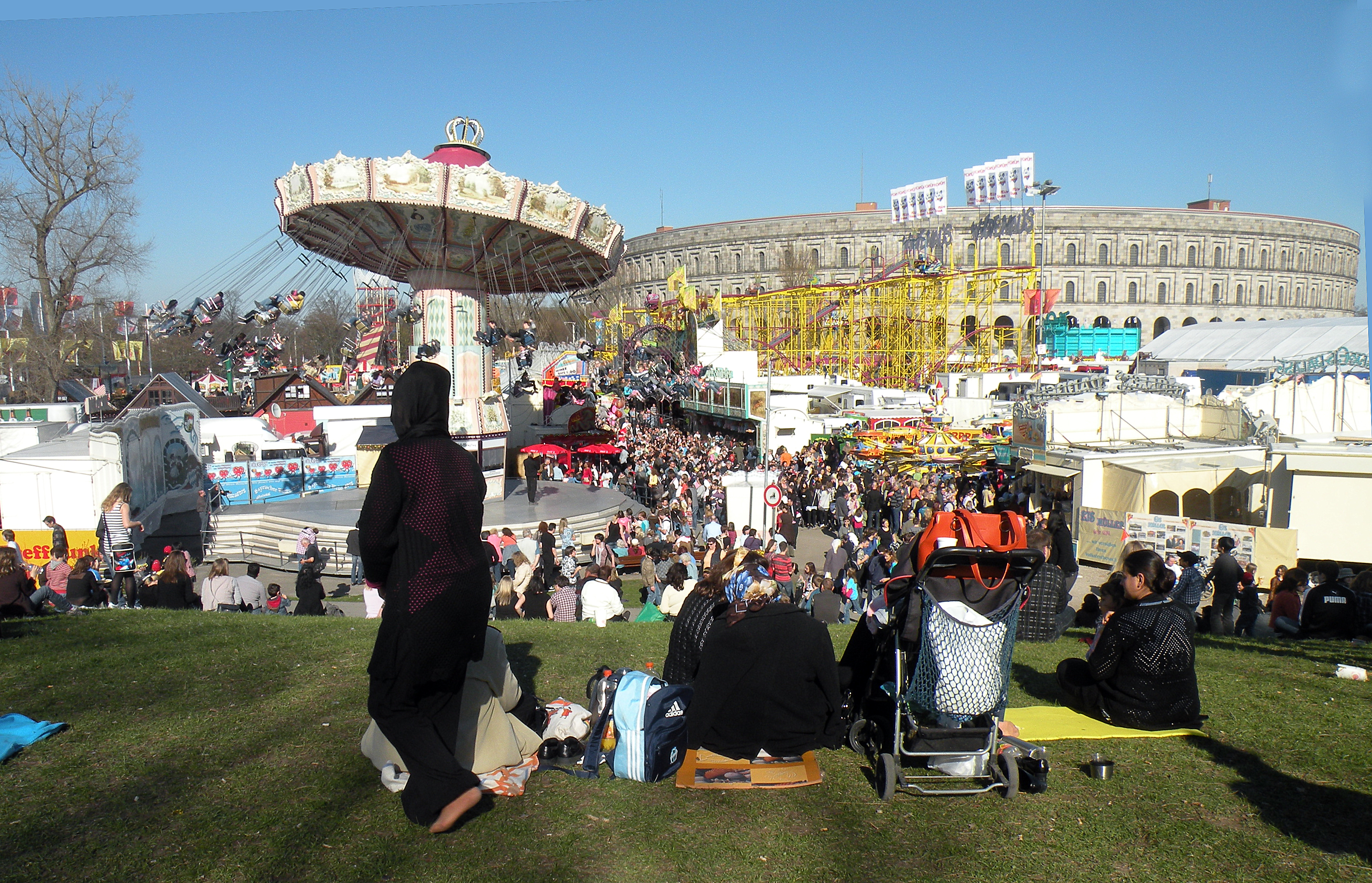 Нюрнберг .Народный праздник